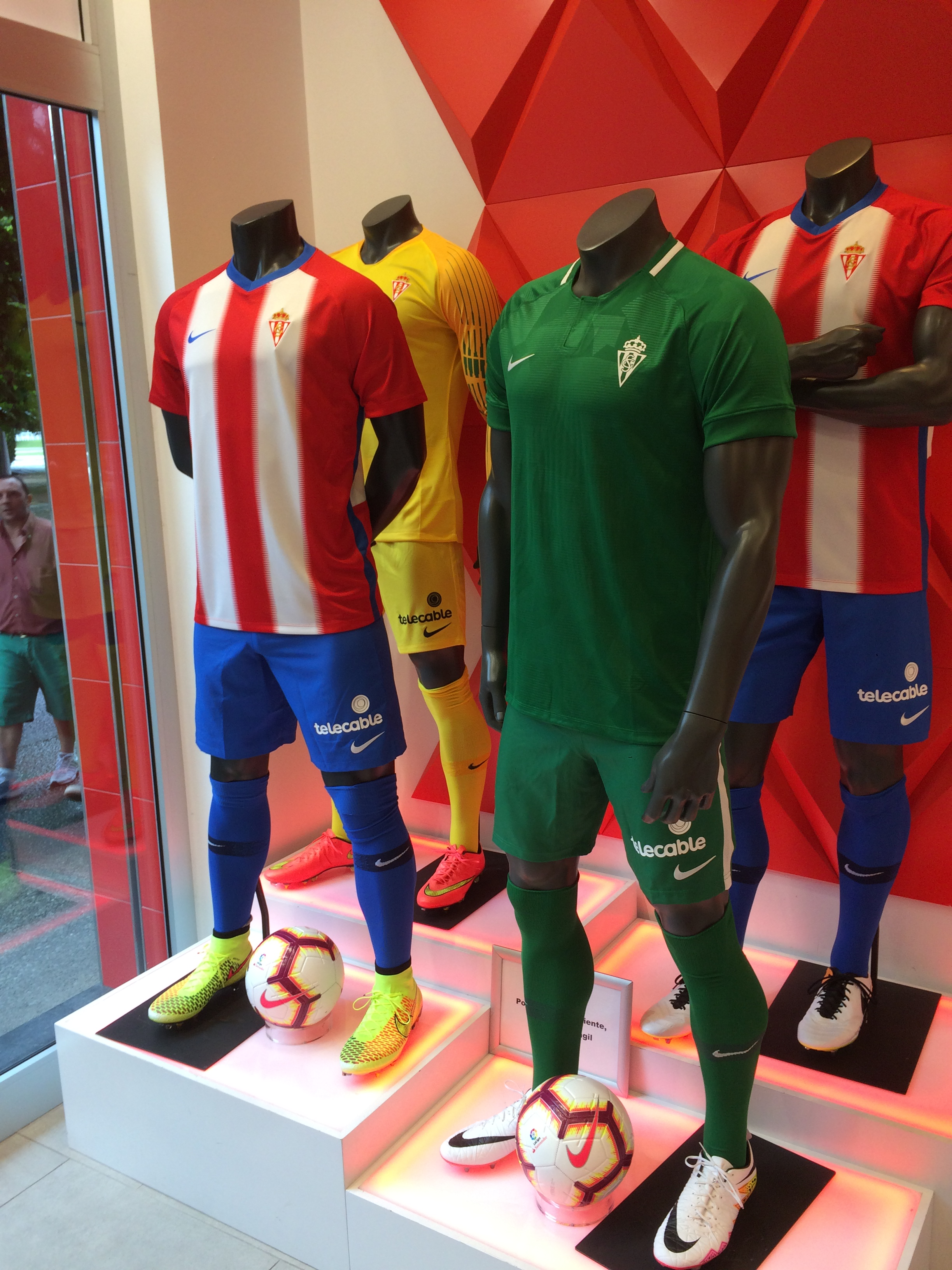 Uniformidad del Real Sporting en el escaparate de la tienda oficial. Temporada 2018-19